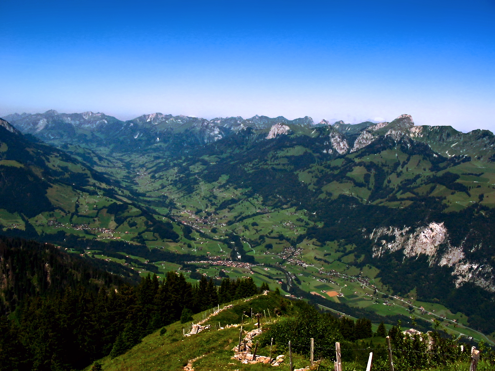 Blick auf das untere Simmental vom Niesen aus gesehen (westwärts); rechts die Stockhornkette mit dem Stockhorn als höchstem Gipfel. Sichtbar Ortschaften: Oey und Erlenbach i.S.